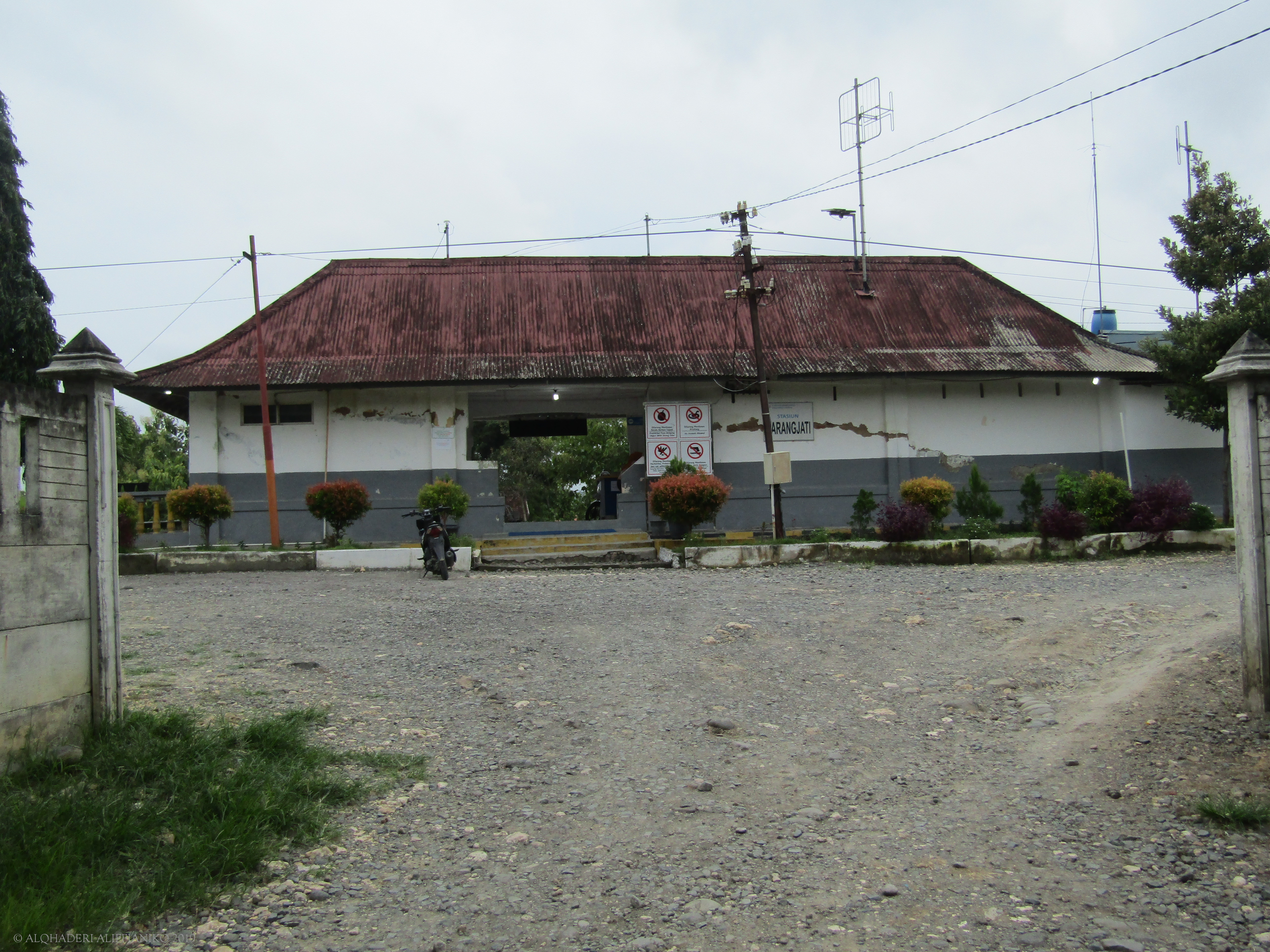 Stasiun Karangjati, 2019